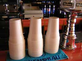 Cachis apilados: imagen de unos cachis en una barra de bar, en concreto, el cibercafé La Facultad de Burgos.